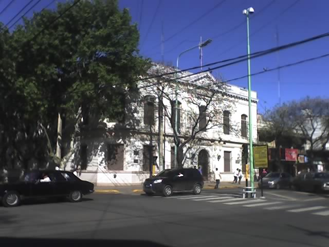 Palacio Municipal de Merlo.